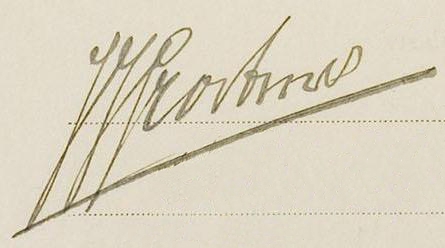 Jan Grootmeijer signature.